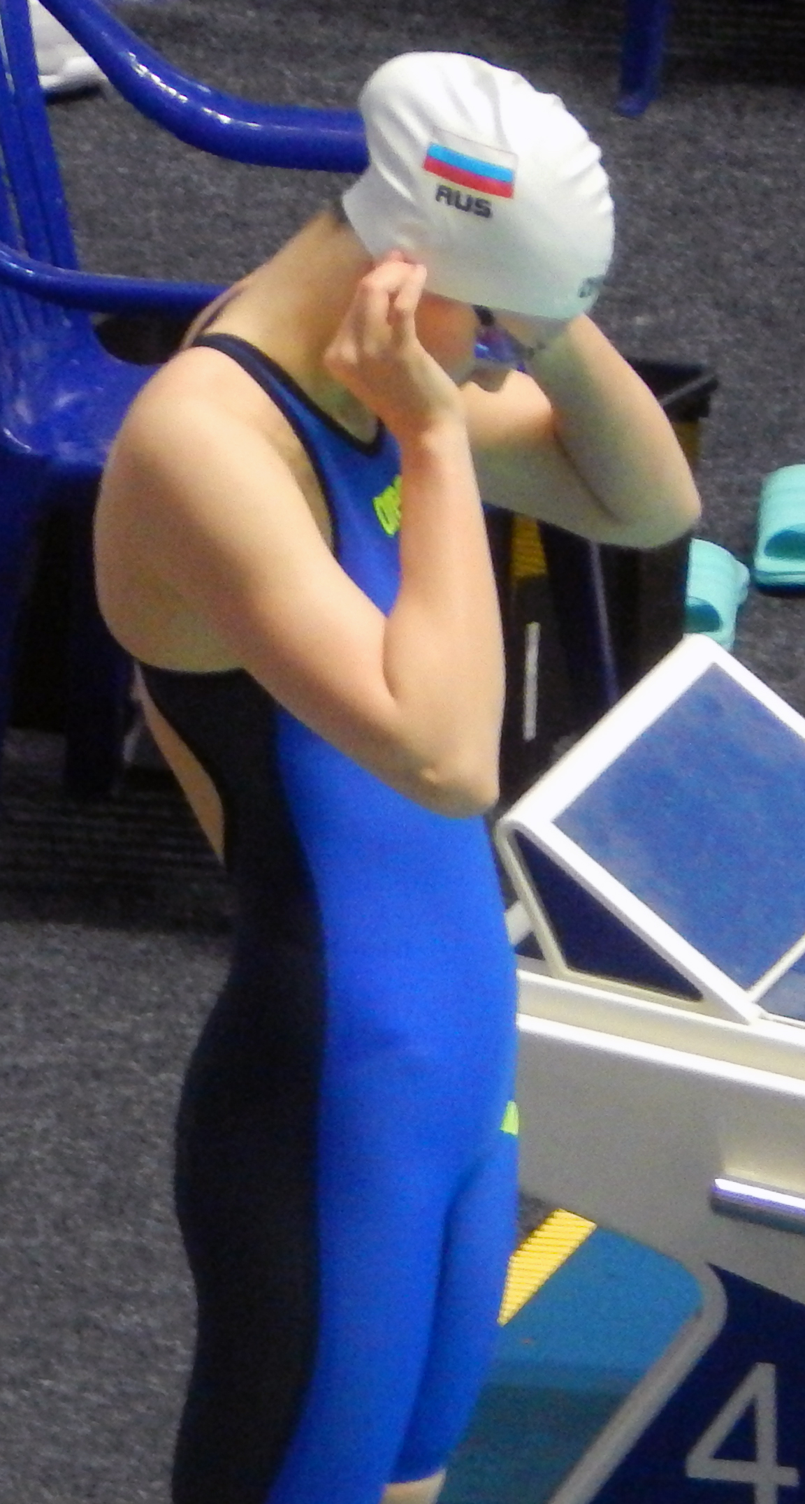 Чемпионат России по плаванию 2018, первый полуфинал на дистанции 50 метров на спине. Дорожка 5 - Дарья Васькина (Москва)